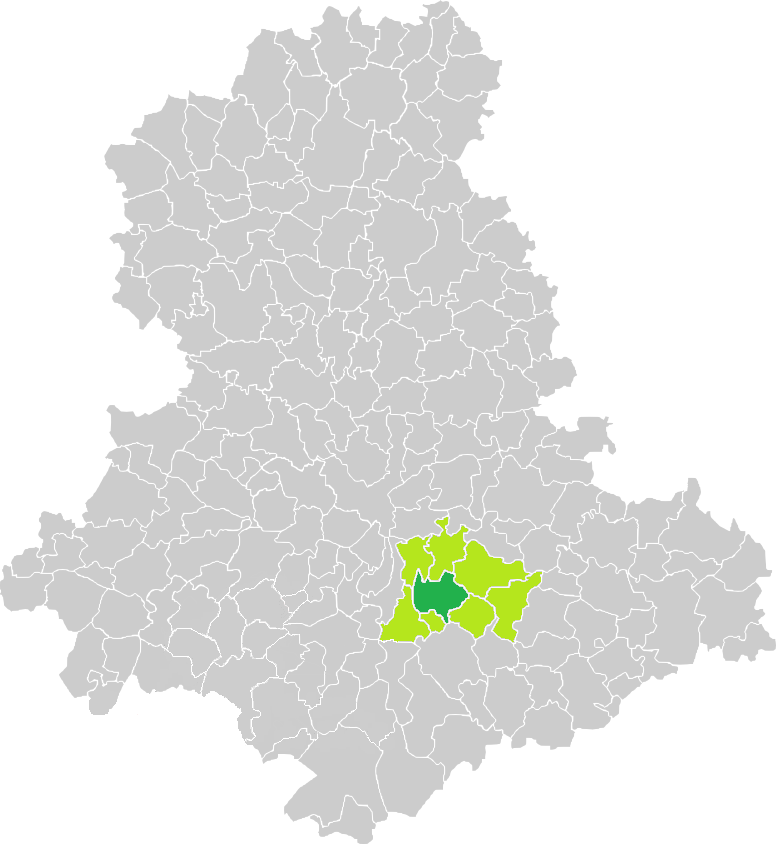 Carte de situation de la commune de Saint-Hilaire-Bonneval (en vert foncé) dans le votre Canton (en vert clair) sur une carte des communes de la Haute-Vienne